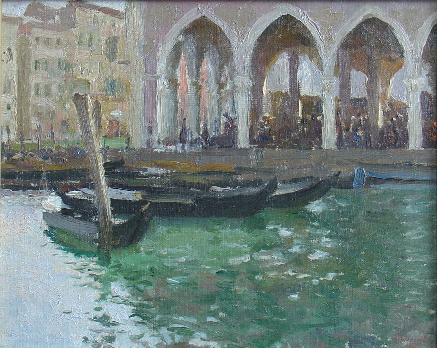 Венеция